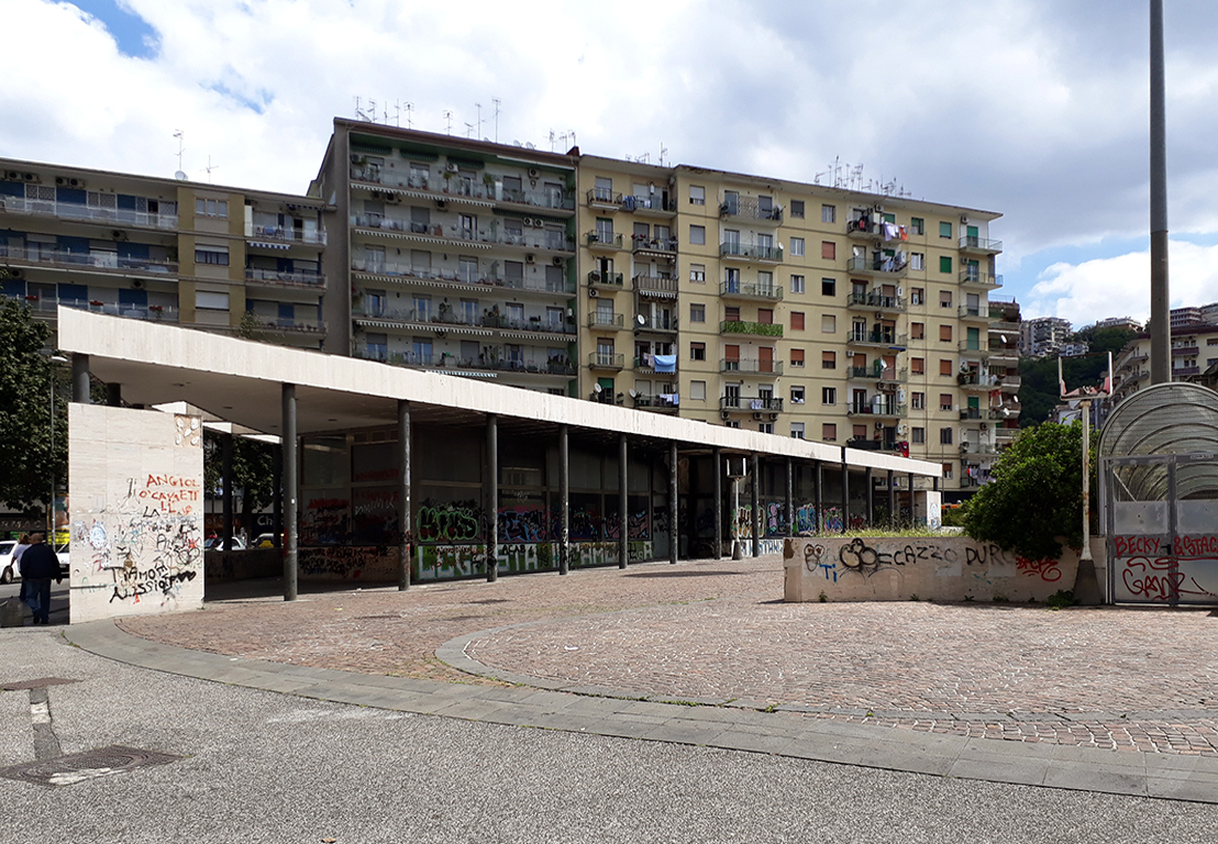 Napoli, stazione Lala della linea 6 della metropolitana.